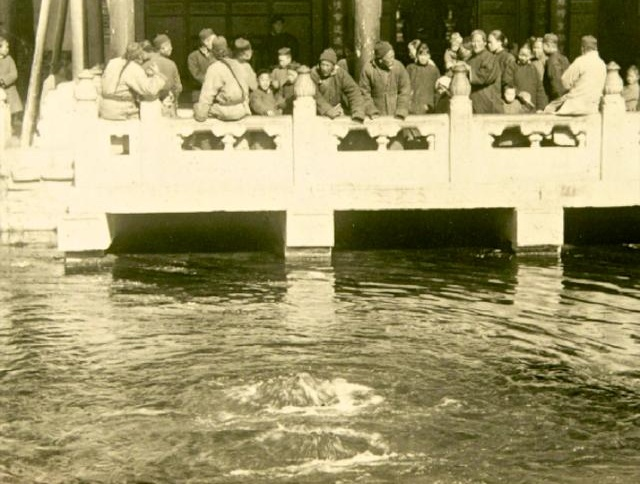 中文（中国大陆）: 济南老照片